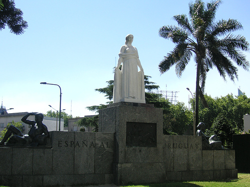 From Spain to Uruguay. Plaza Isabel la Catolica, Montevideo, Uruguay.